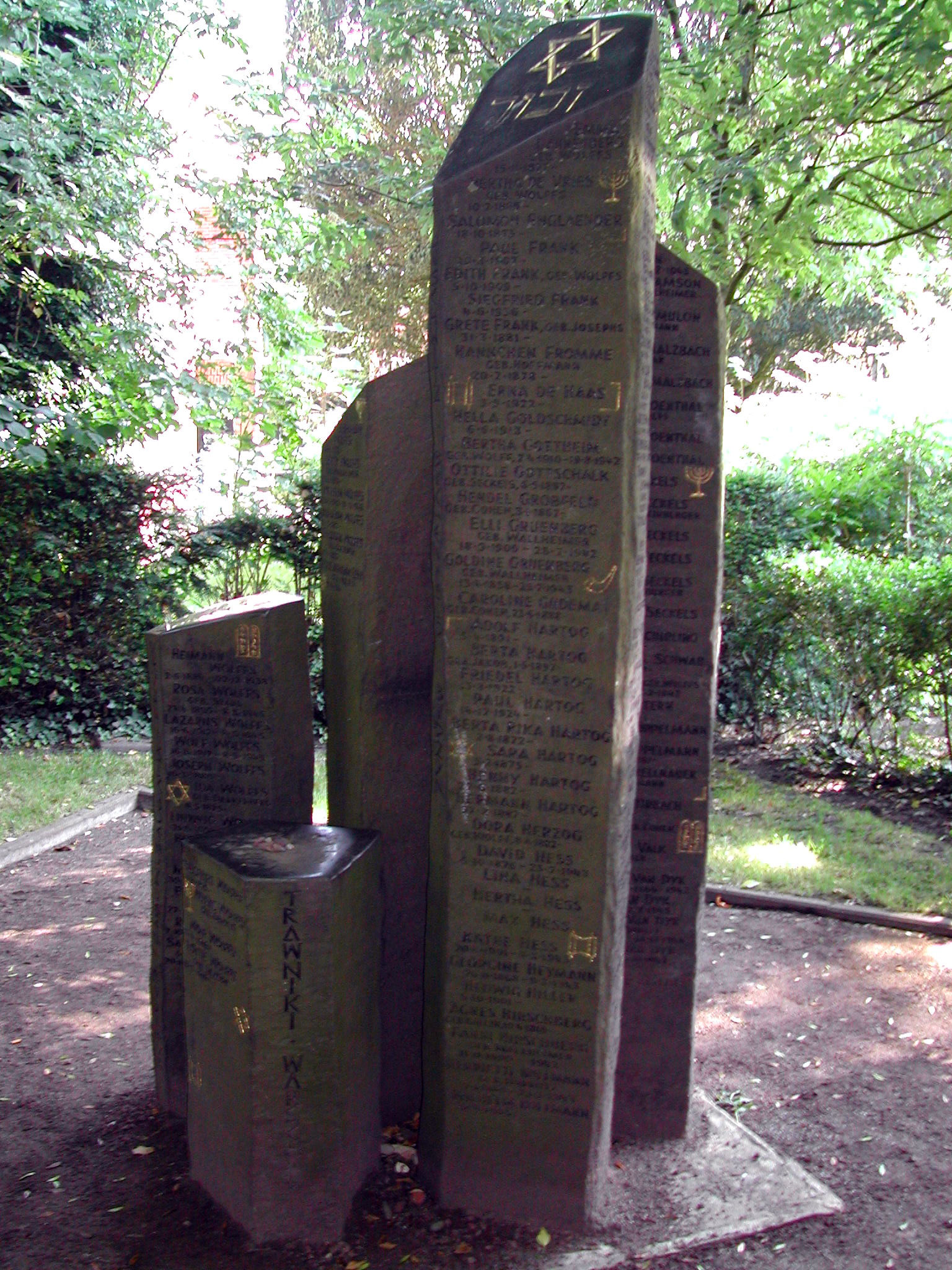 jewish memorial in aurich, erstellt durch Steinmetz Bernd Clemenz, Aurich